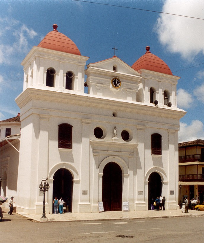 Iglesia de Nuestra Señora del Rosario de Chiquinquirá, en El Santuario.